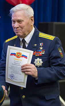 Герой России Владимир Ильич Шарпатов